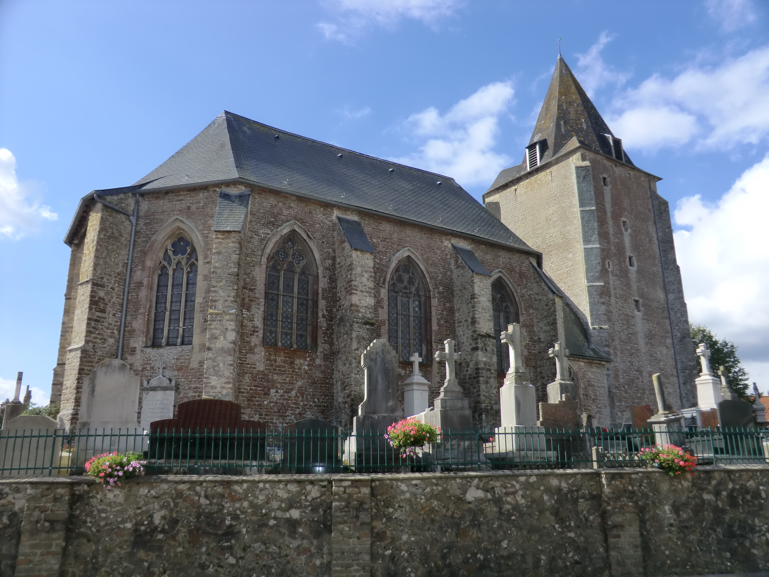 Église de Crémarest inscrite au patrimoine, Pas-de-Calais, France .